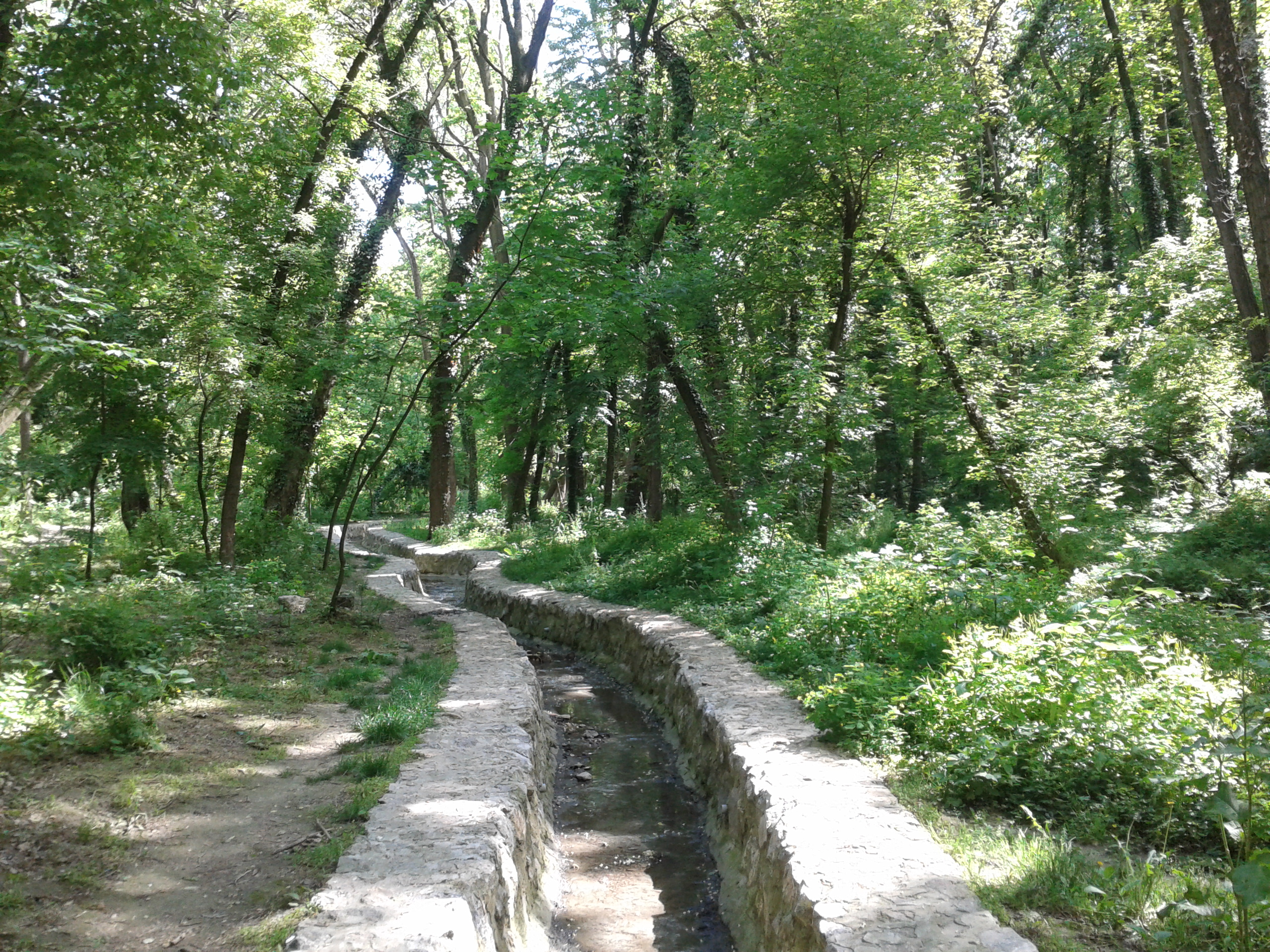 Српски (ћирилица): Ово је фотографија заштићеног природног добра у Србији под шифром: СП003 This is a a photo of a natural area in Serbia with ID: СП003